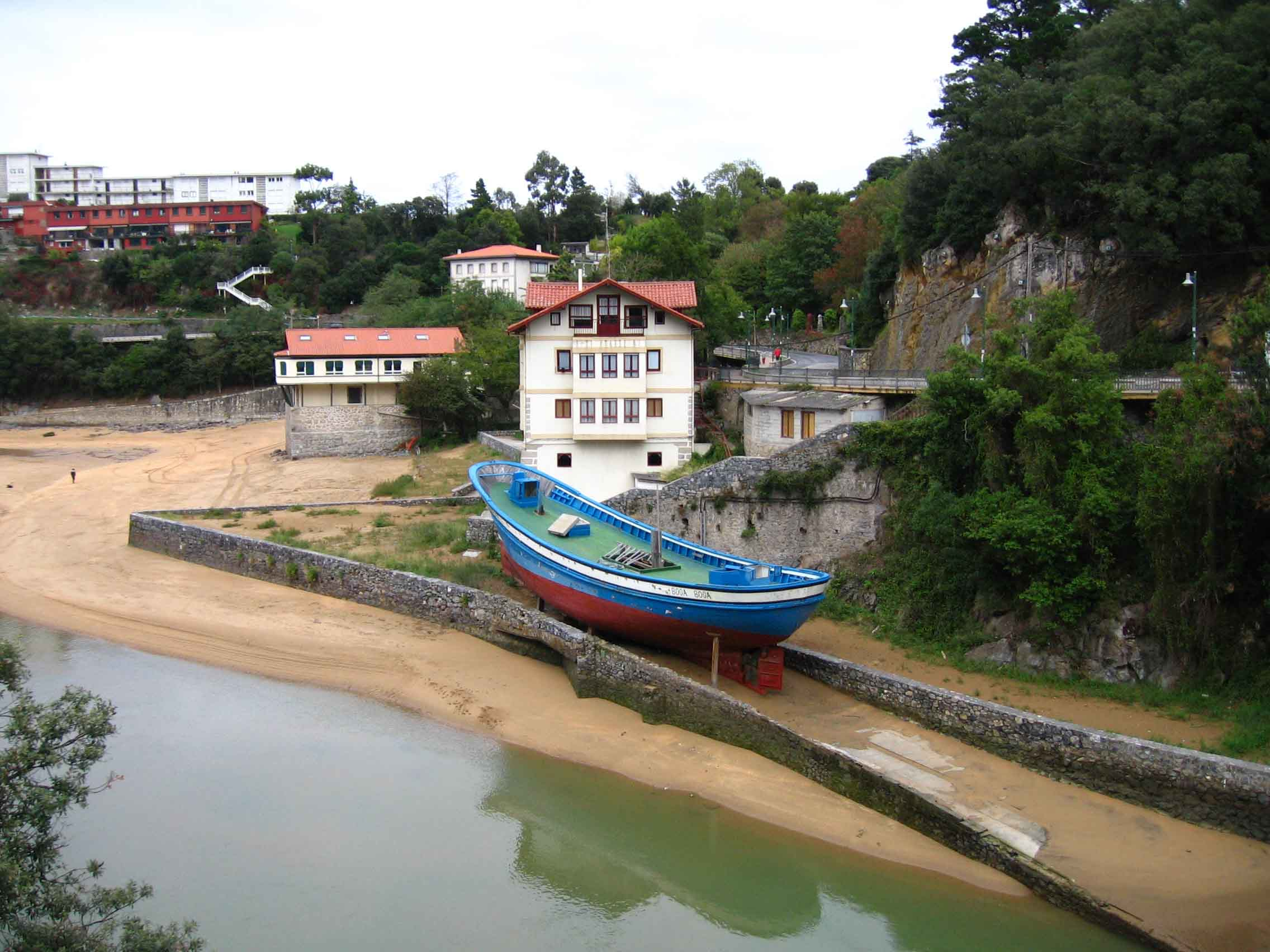 ASTILLERO